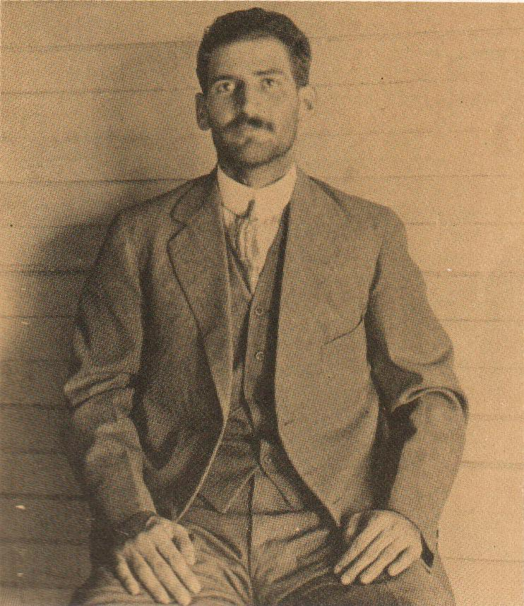 General Fortunato Maycotte